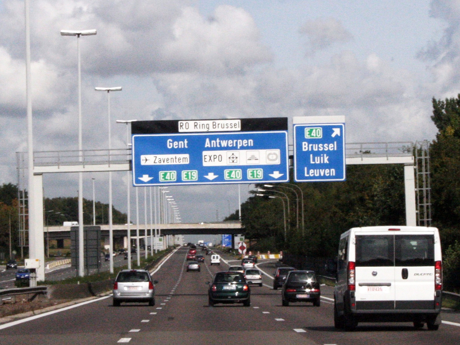 Ring de Bruxelles au niveau de l'échangeur Sint-Stevens Woluwe